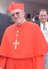 Cardenal Javier Lozano Barragán en sus bodas de plata episcopales en la Basílica de Guadalupe